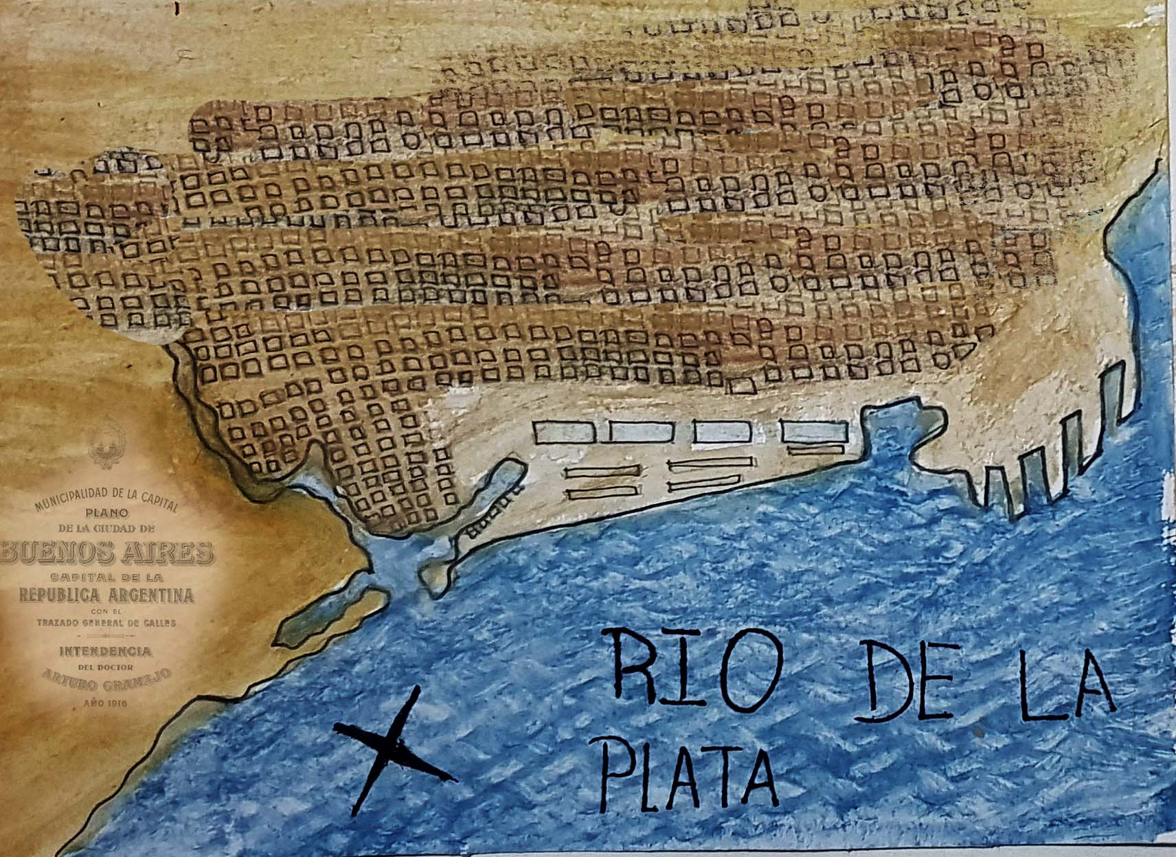 casco historico del puerto por madero